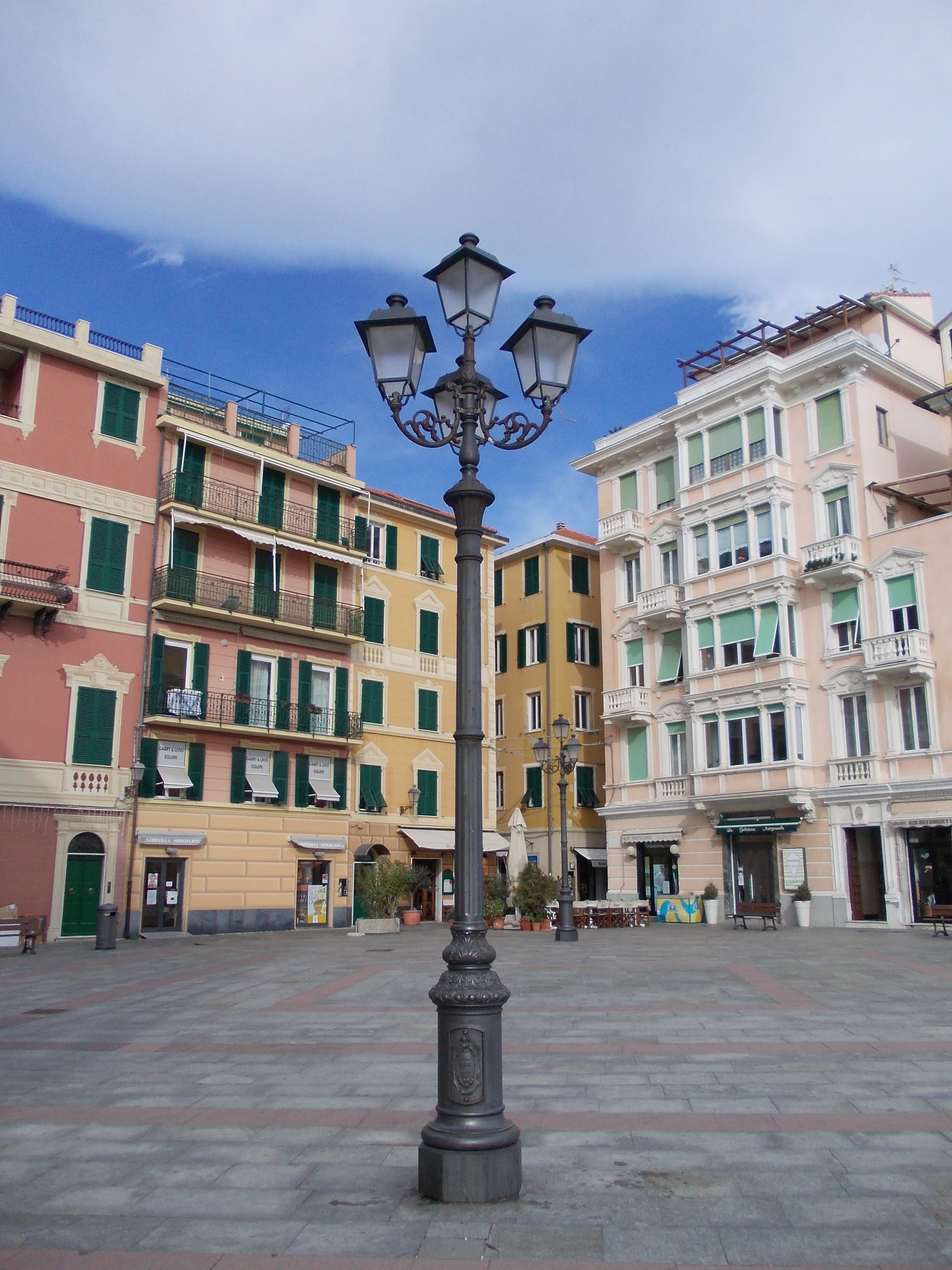 Varazze, piazza Bovani, ciassa du Balùn, inverno 2013